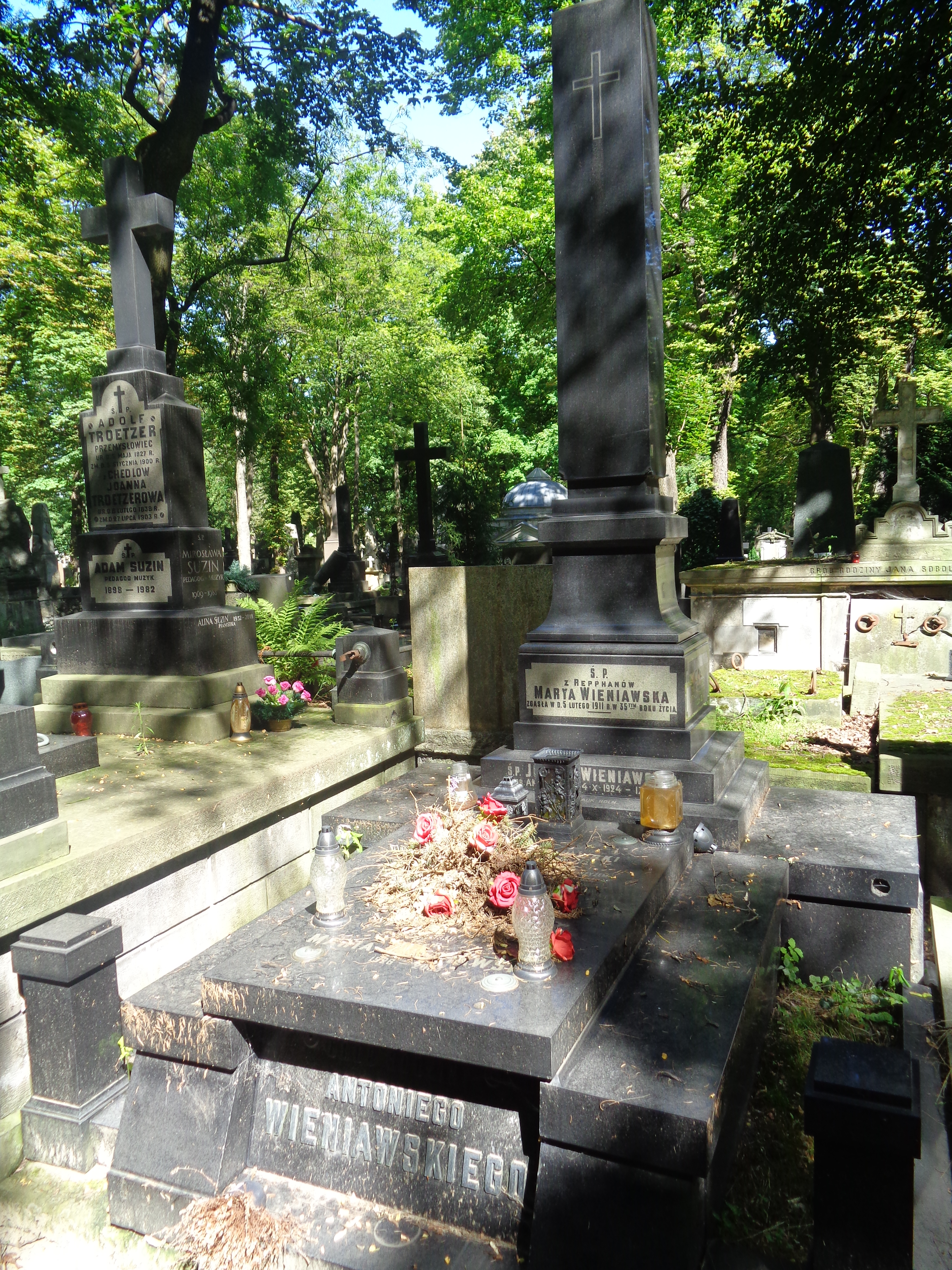 Grób Antoniego Wieniawskiego na Cmentarzu Powązkowskim